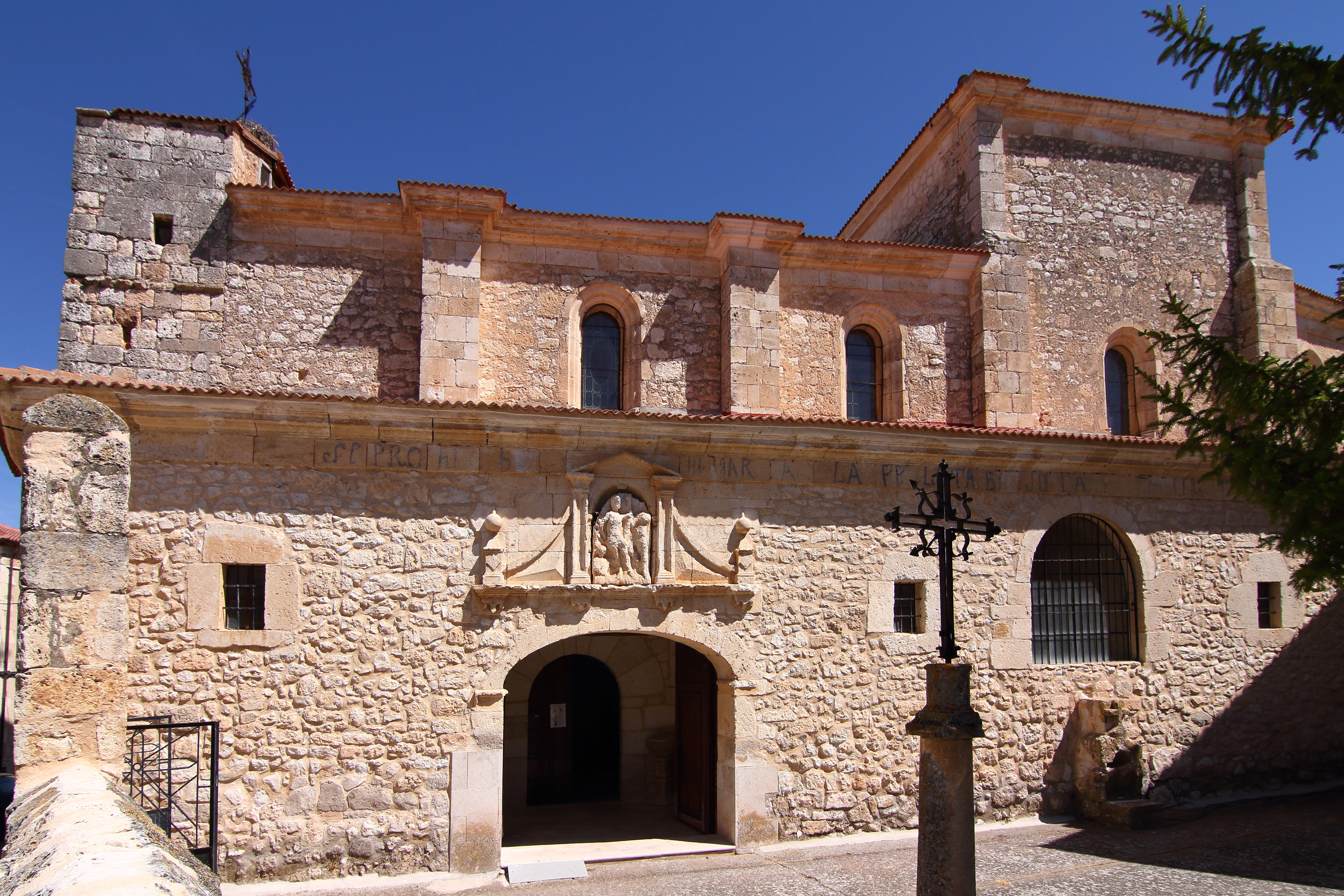 Fuentemolinos, Iglesia de San Bartolomé Apóstol, 03